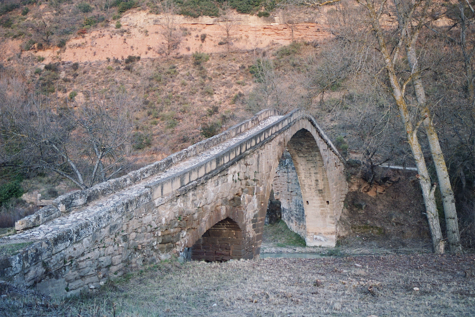 Pont romain, barranco Portiacha, Sp-Bárcabo.